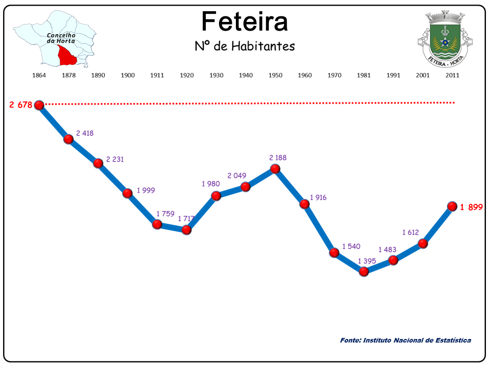 População